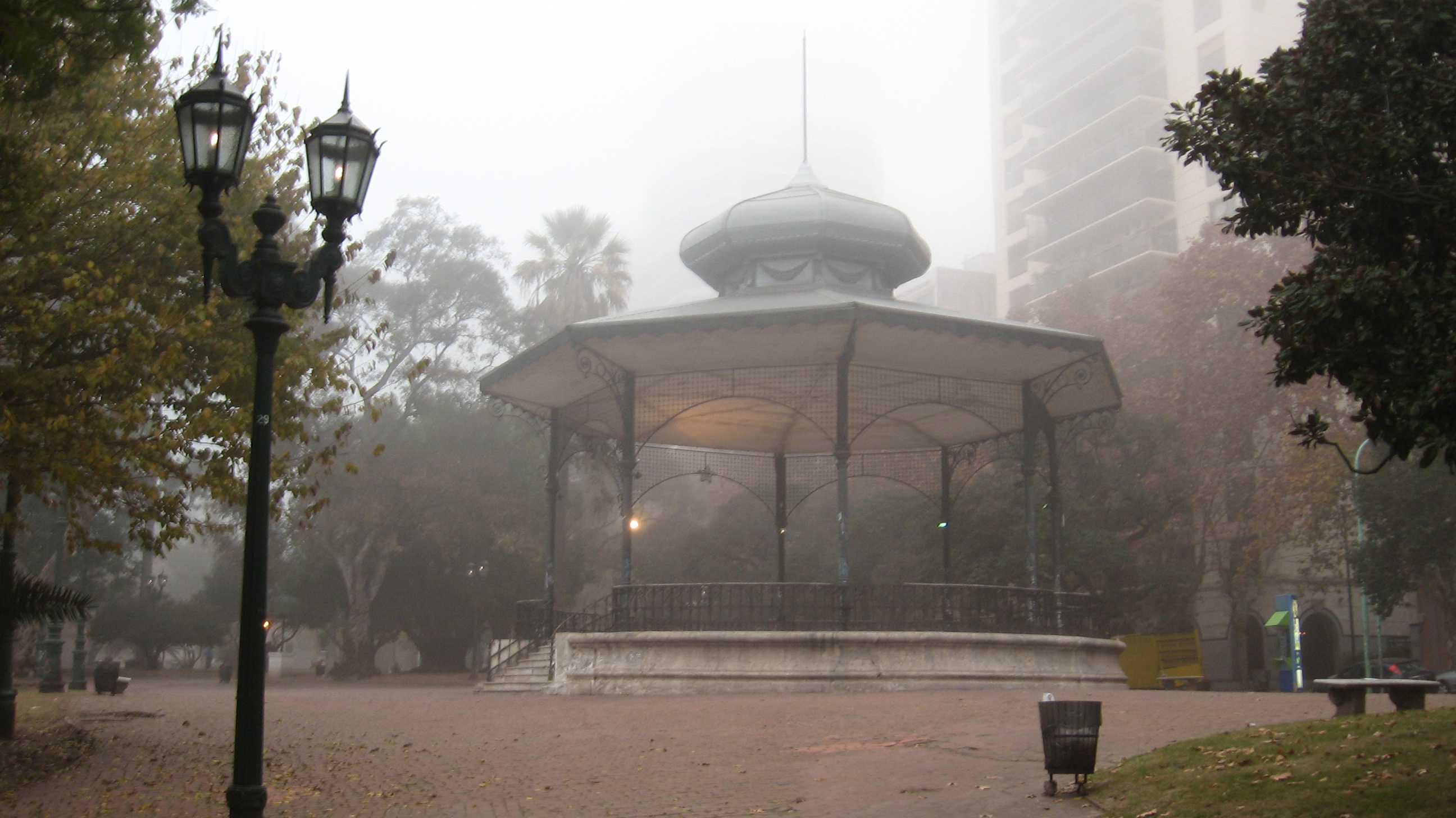 Glorieta - Pabellón situado en Barrancas de Belgrano, en el barrio de Belgrano de la ciudad de Buenos Aires